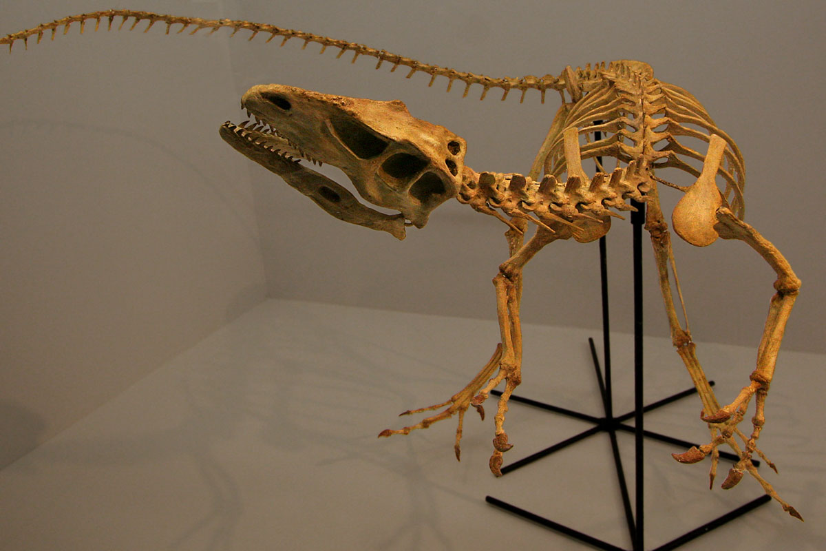 Santanaraptor - 01